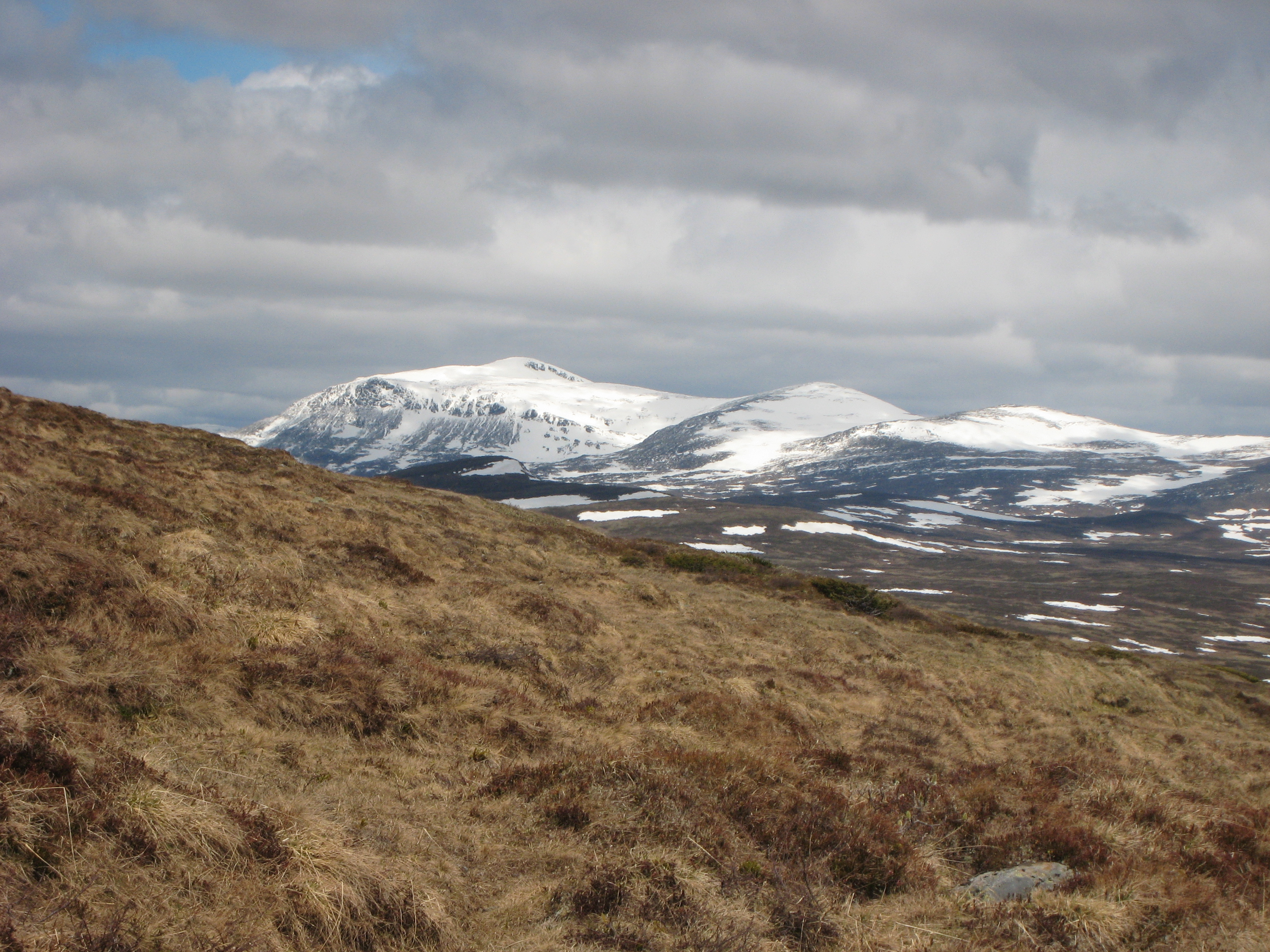 Härjångfjället i juni 2009